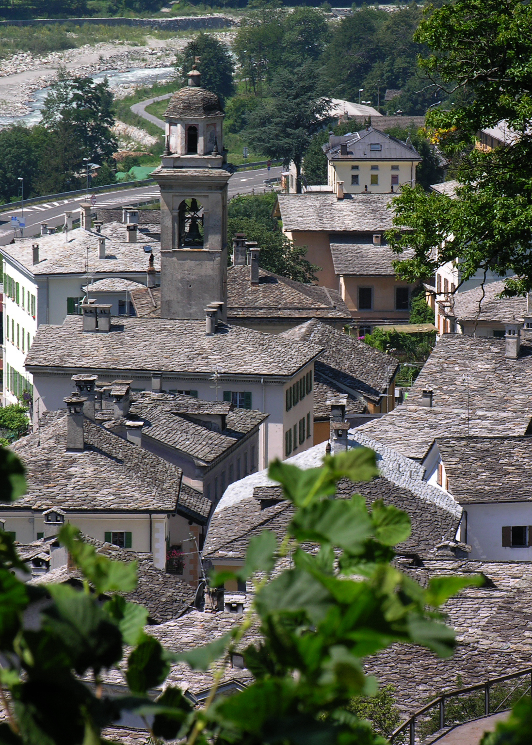 Switzerland, Graubünden, Castasegna